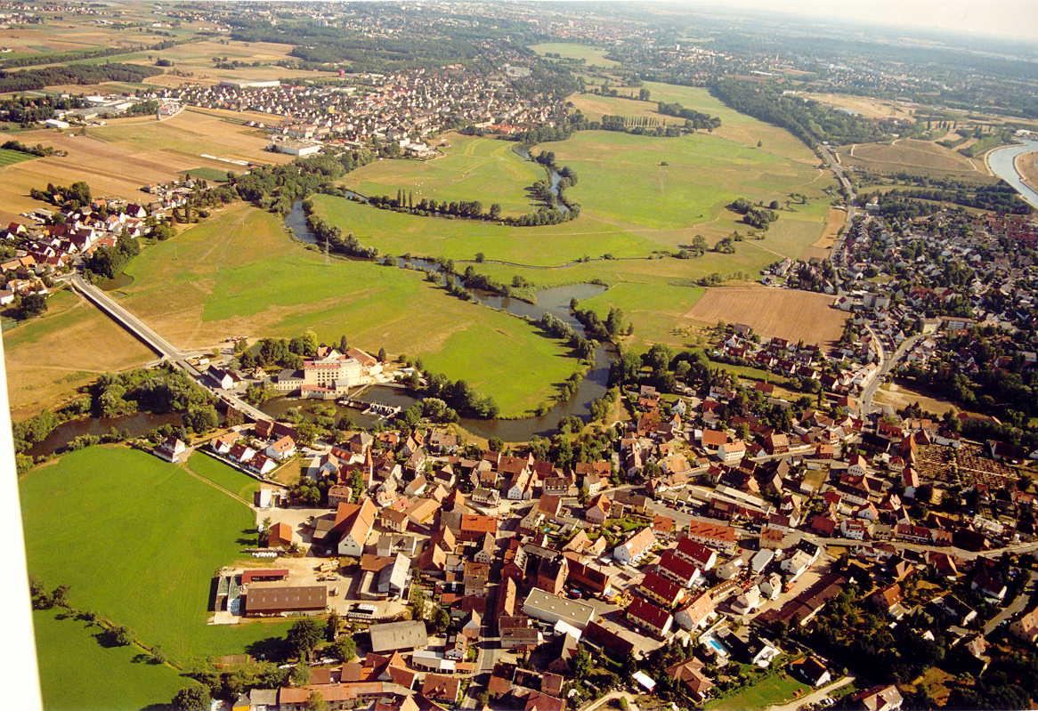 Vach im Jahrhundert-Sommer (Juli 2003)